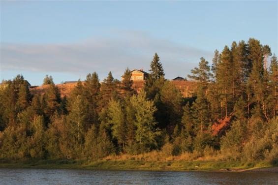 Коми: Кыр йыв